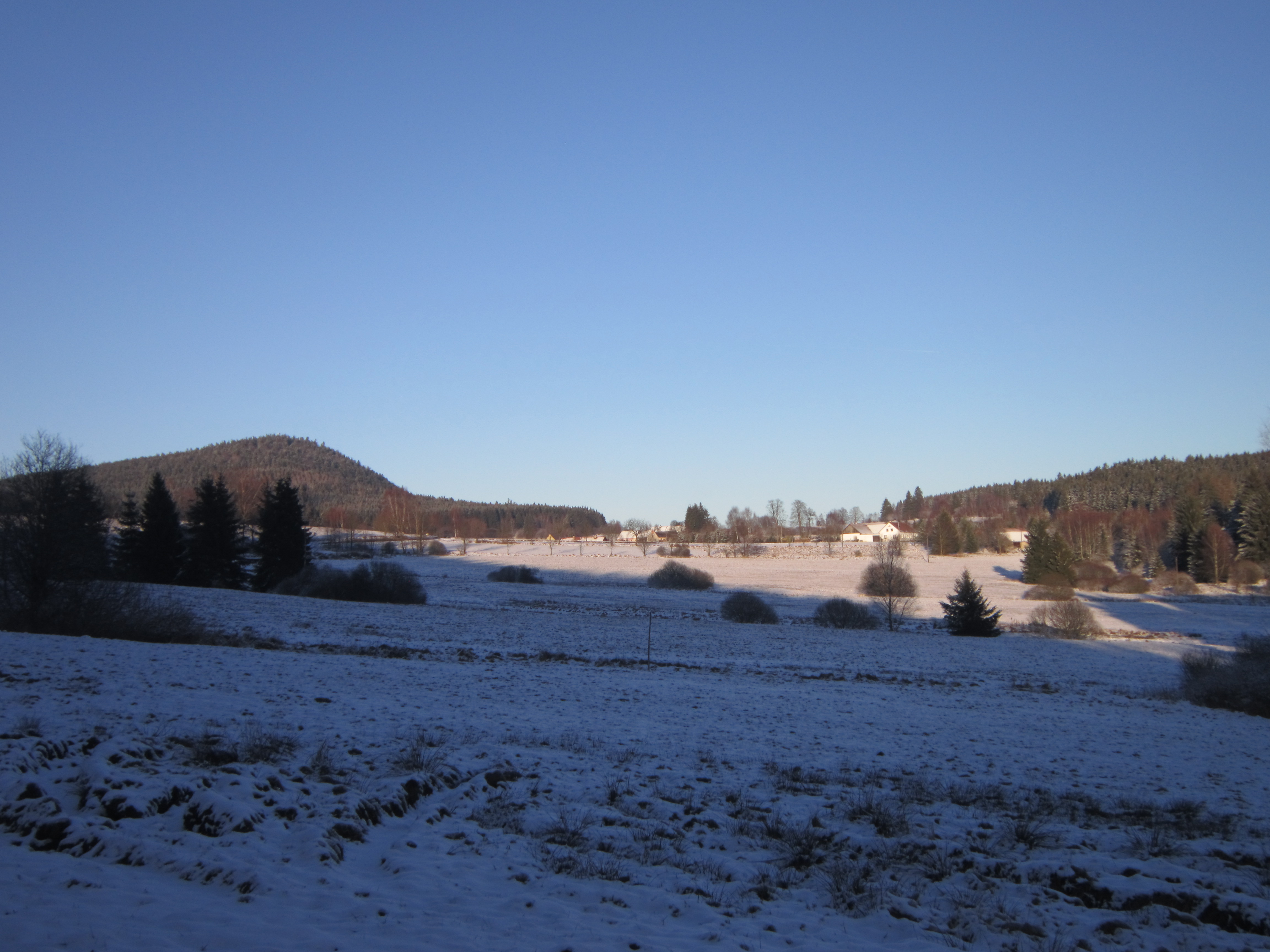 Staré Hutě z Mlýnského Vrchu.